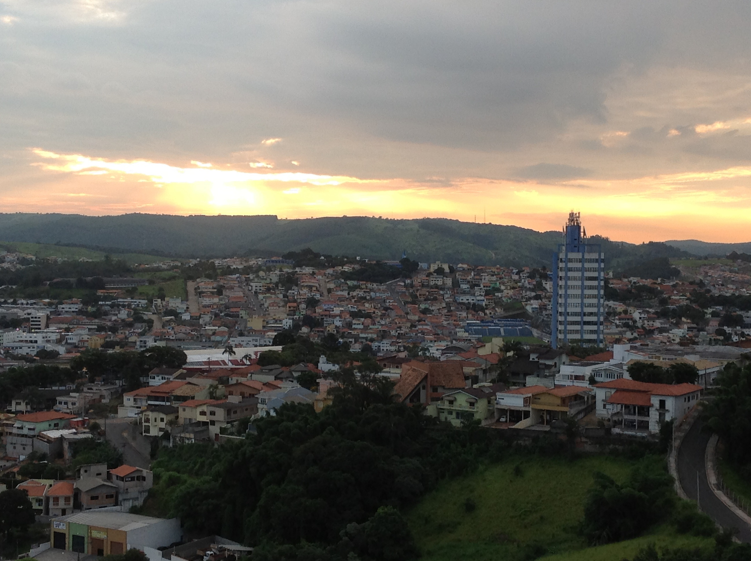 Fim de tarde em Itatiba